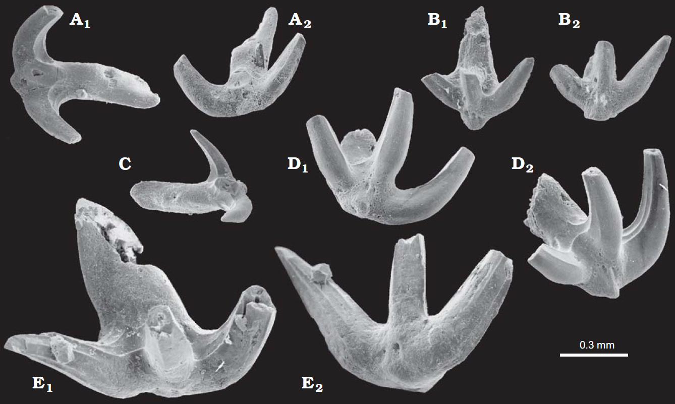 Phoebodontid chondrichthyan Thrinacodus dziki sp. nov. from the upper Viséan of Cawdor Quarry, Matlock, Derbyshire, England, UK; sample Cawdor 5. A. NHMUK PV P73271, in oral (A1) and labial (A2) views. B. NHMUK PV P73272, in oral (B1) and labial (B2) views. C. NHMUK PV P73273, in lateral view. D. NHMUKPV P73274, in labial (D1) and oblique labial (D2) views. E. NHMUK PV P73275, in oral (E1) and labial (E2) views.